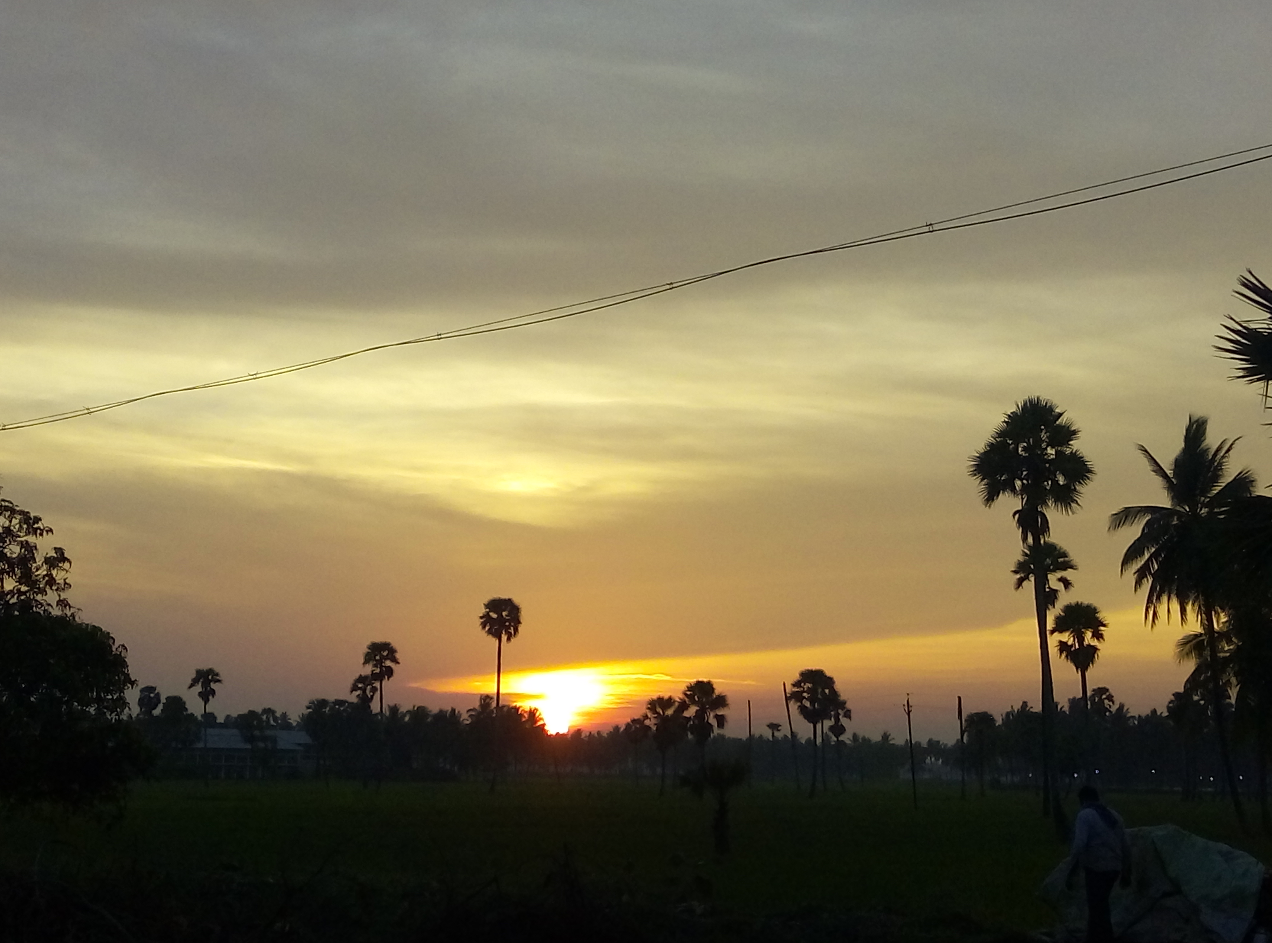 Sunset near Pippara, West Godavari district, Andhra Pradesh